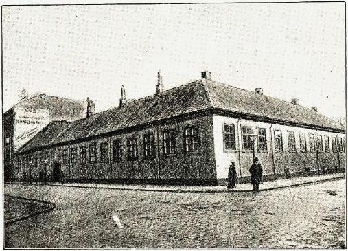 Paleet.